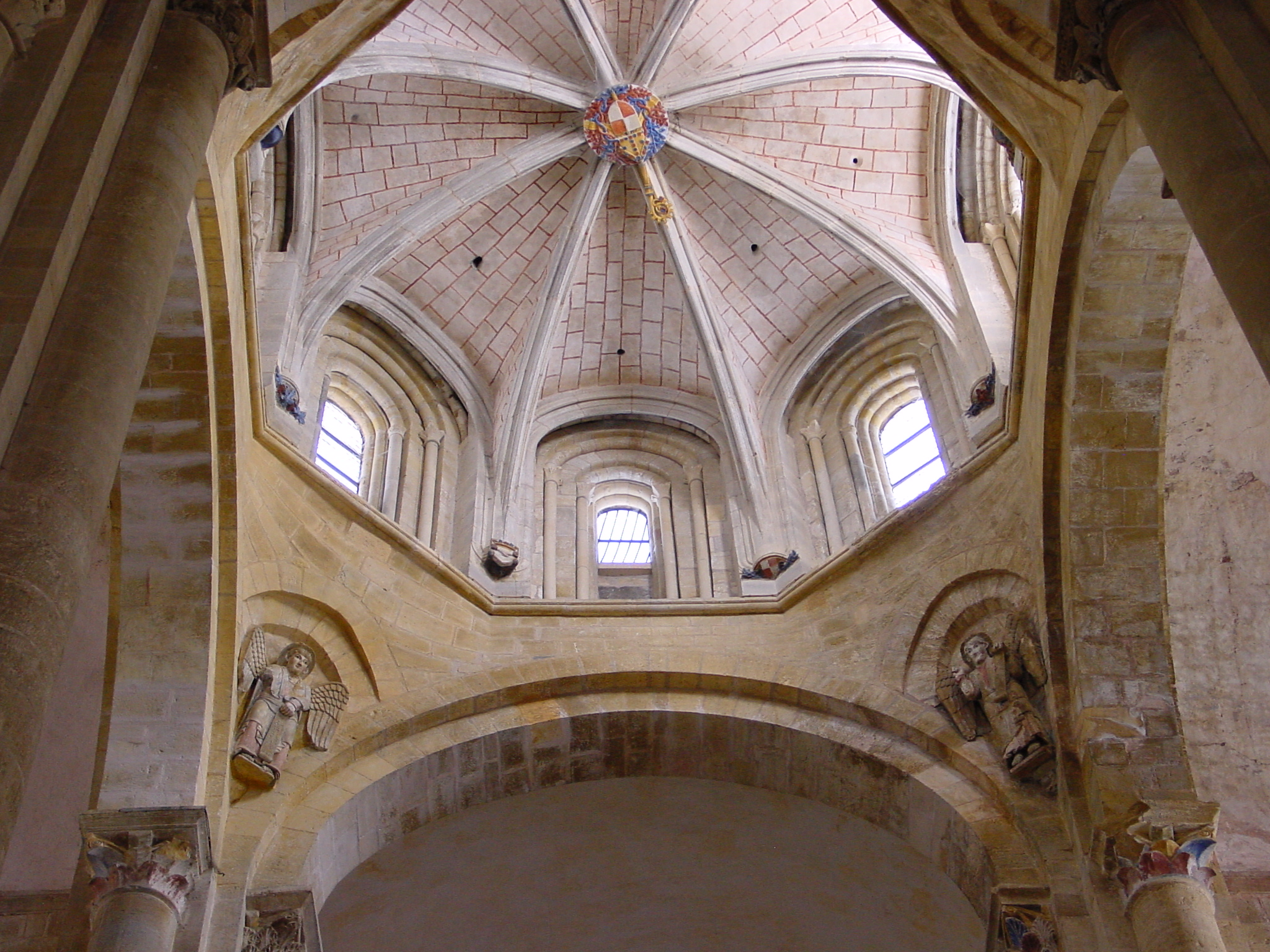 La tour lanterne de l'église abbatiale de Conques (XVe s)